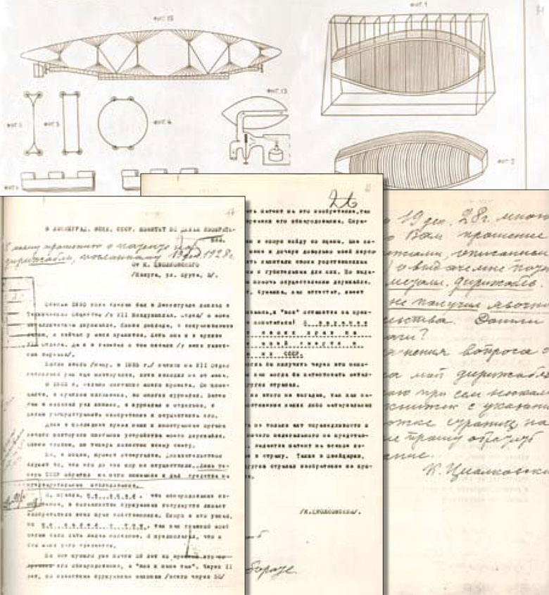 tsiolkovsky dirigible patent application Циолковский К.Э. Металлический дирижабль. Заявочные материалы на изобретение. 1929 г.